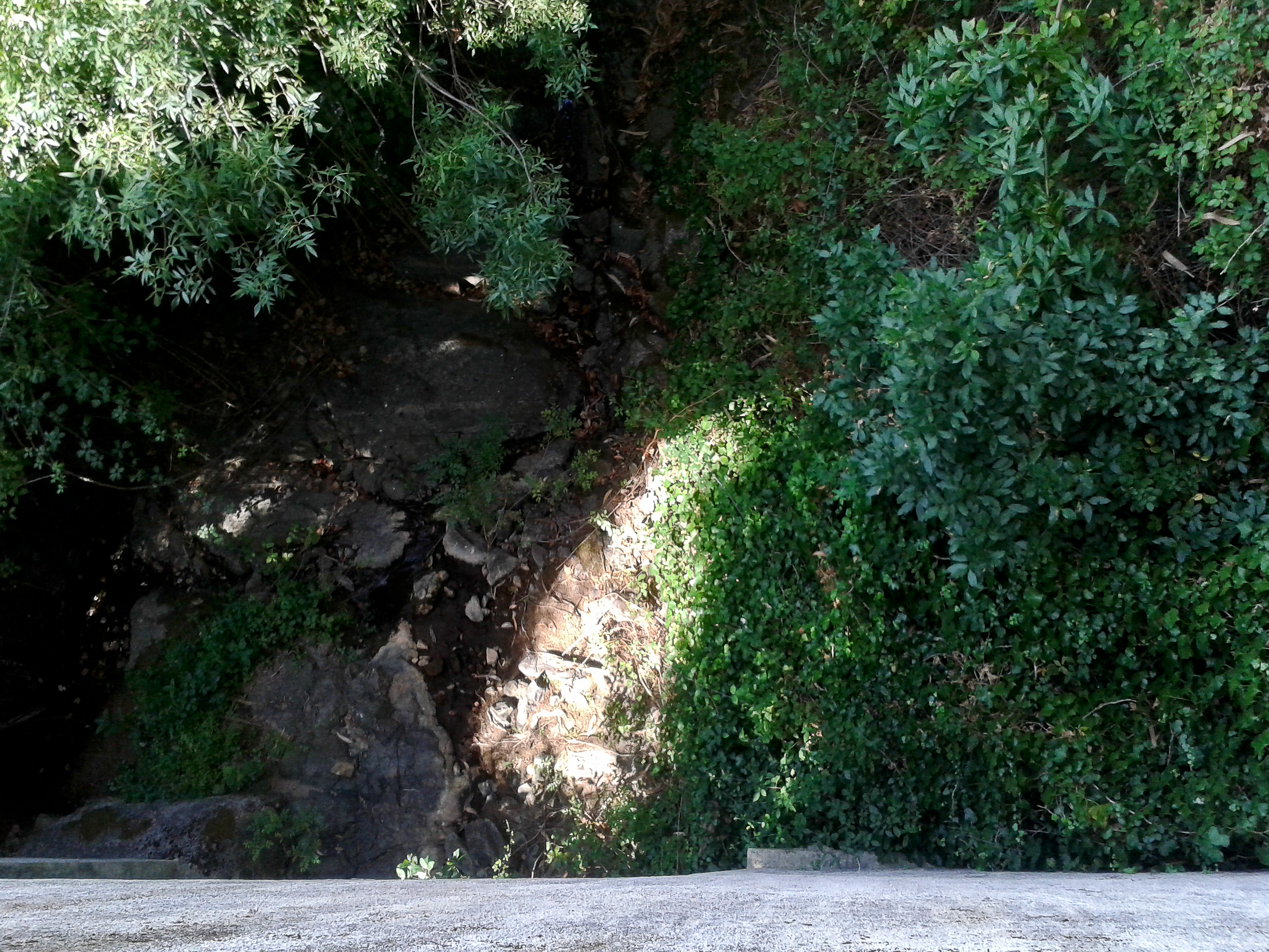 Ribeiro de Pombal visto do Cano Alto do Aqueduto da Água de Prata. É o principal acidente orográfico do percurso do aqueduto. Por ser de difícil acesso ao ser humano, neste troço podem-se observar resquícios de bosques mediterrânicos que no resto do percurso foram alterados para usos agro-pastoris. A fotografia é tirada a partir da arcada denominada Cano Alto e que fez parte das obras de melhoramento no século XIX. Perto da linha de água podem-se observar espécies como freixo, loureiro, salgueiro, heras e silvas; mas afastadas, temos azinheiras, oliveiras, salsaparilha, medronheiro...